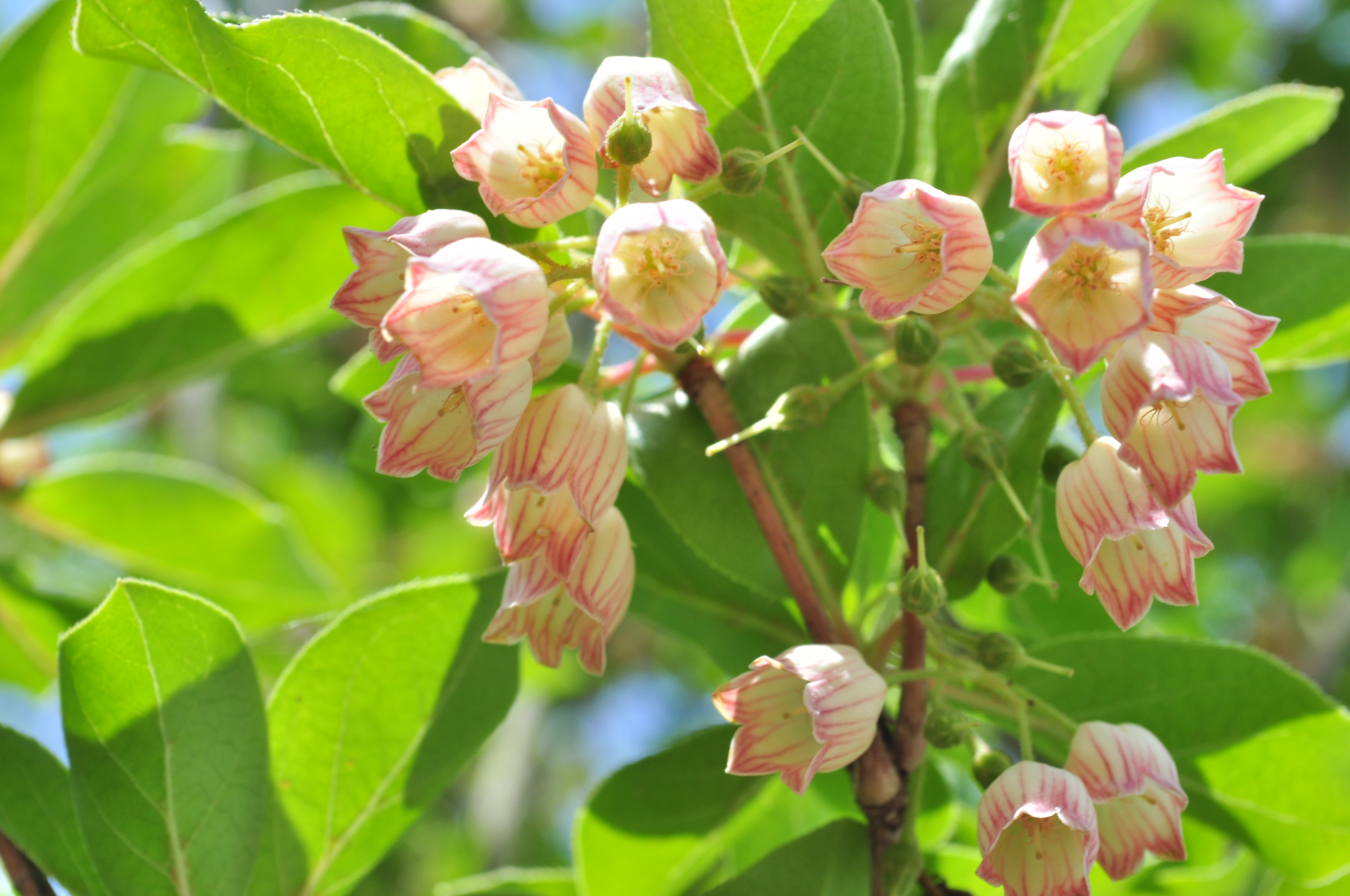 Enkianthus campanulatus 03